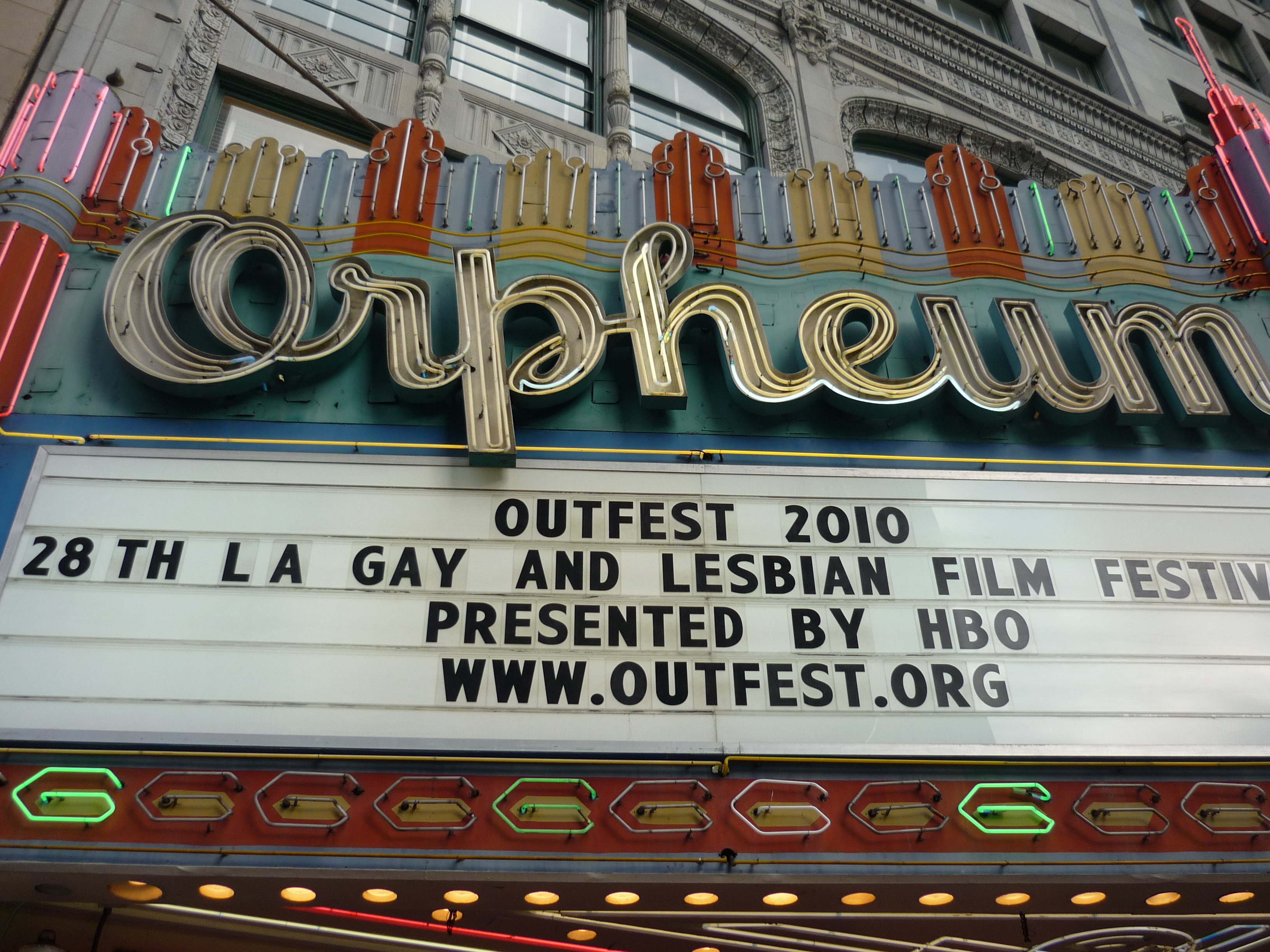 Outfest 2010